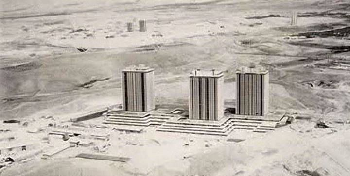 مجتمع آ اس پ در حال ساخت - 1348